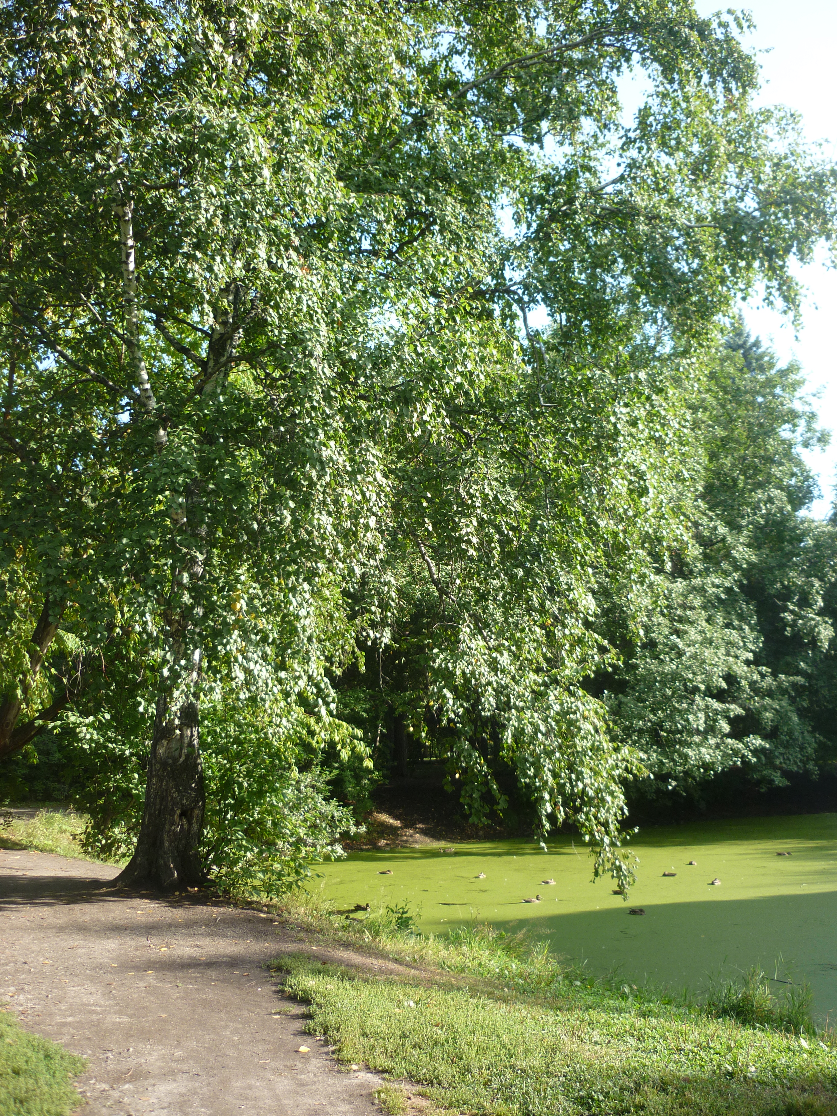 Дендрологический парк-выставка возле УПИ, Ебург.